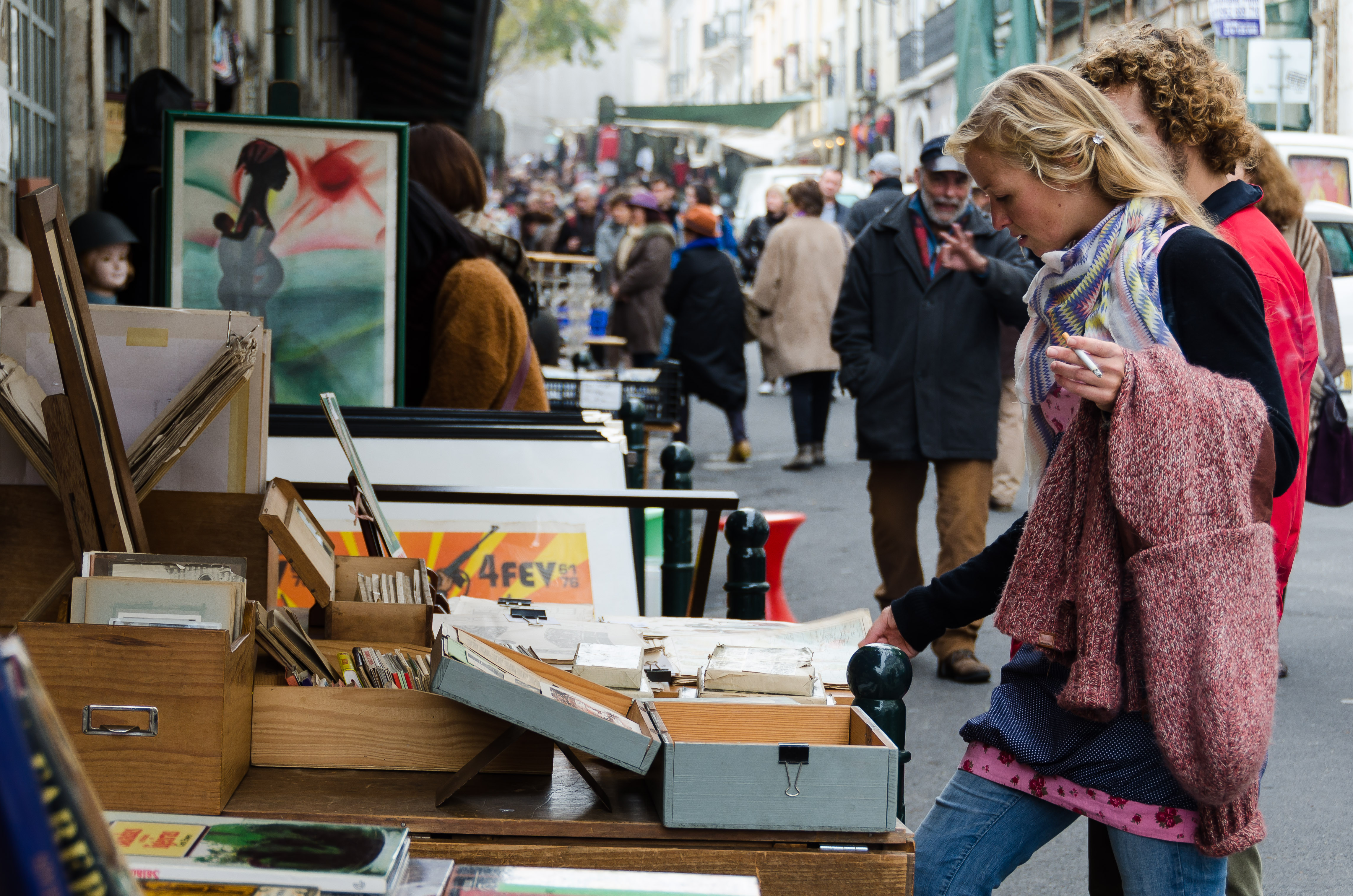 Lisboa 016